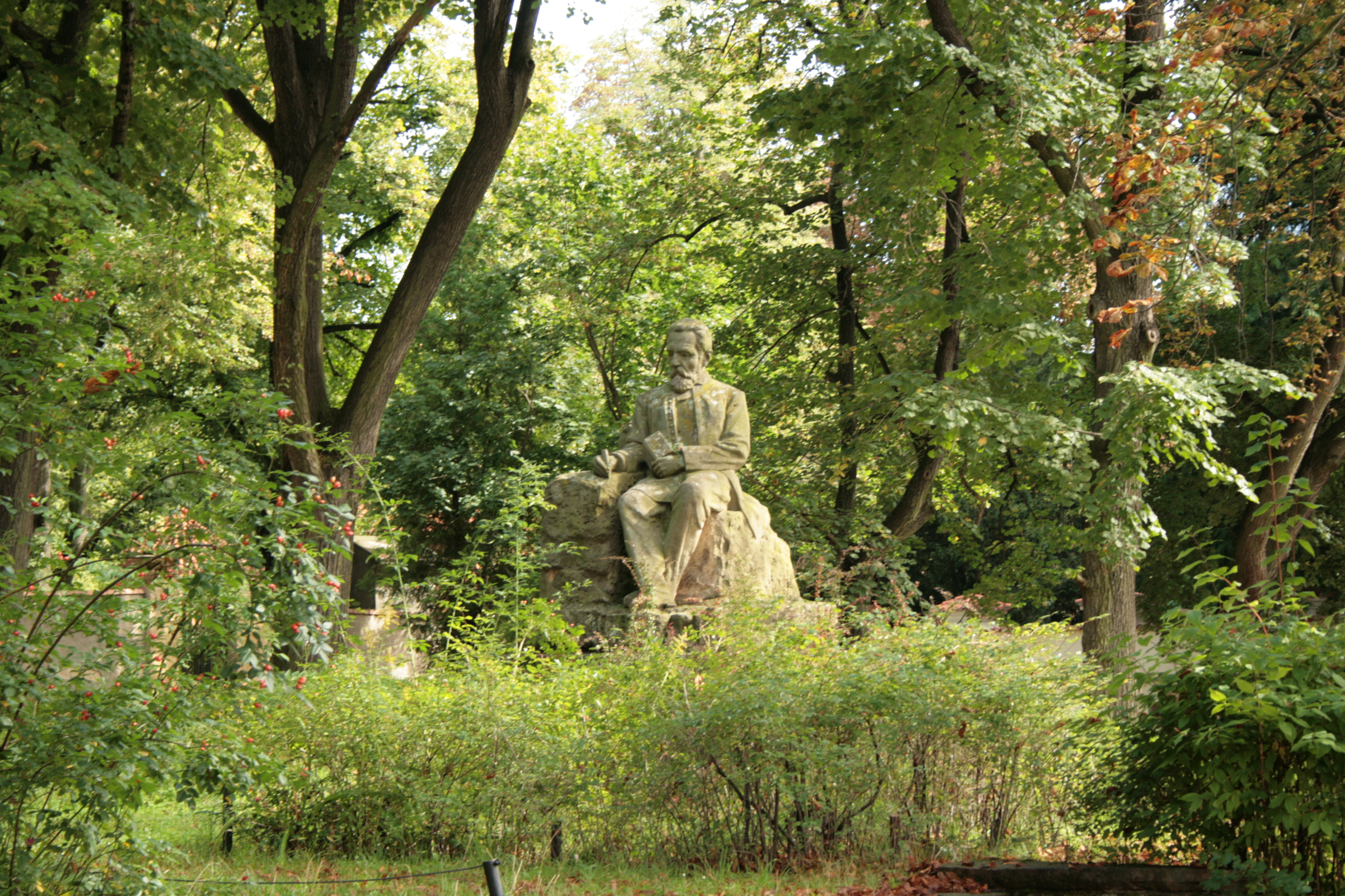 Socha Svatopluka Čecha v Litni před kostelem, původní místo, kde stávala lípa z jeho díla Ve stínu lípy.